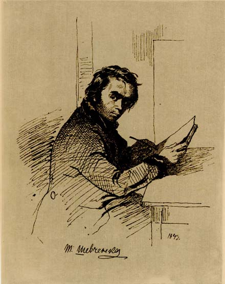 Self-portrait